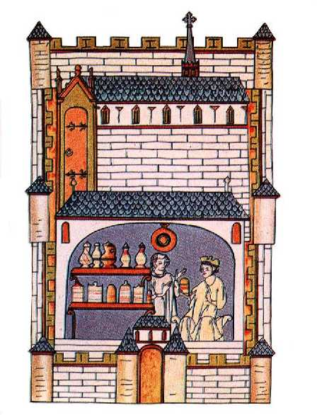 Botica medieval